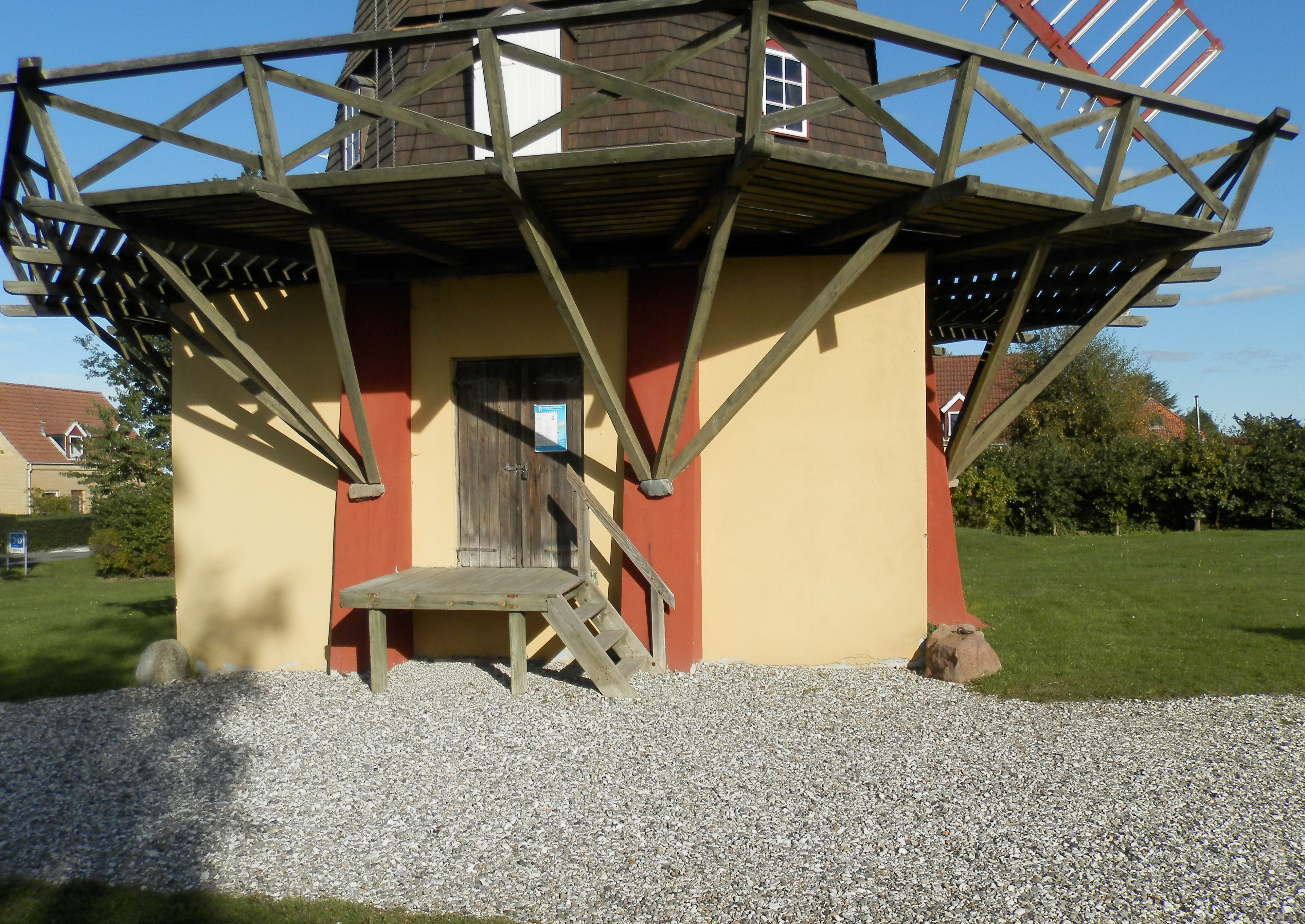 Ramløse Mølle september 2013